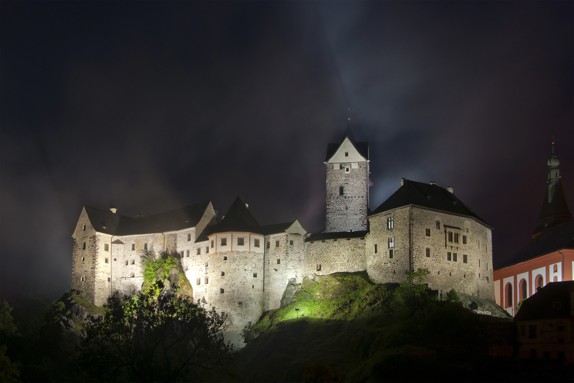 Hrad Loket (Loket), Zámecká 66, Loket